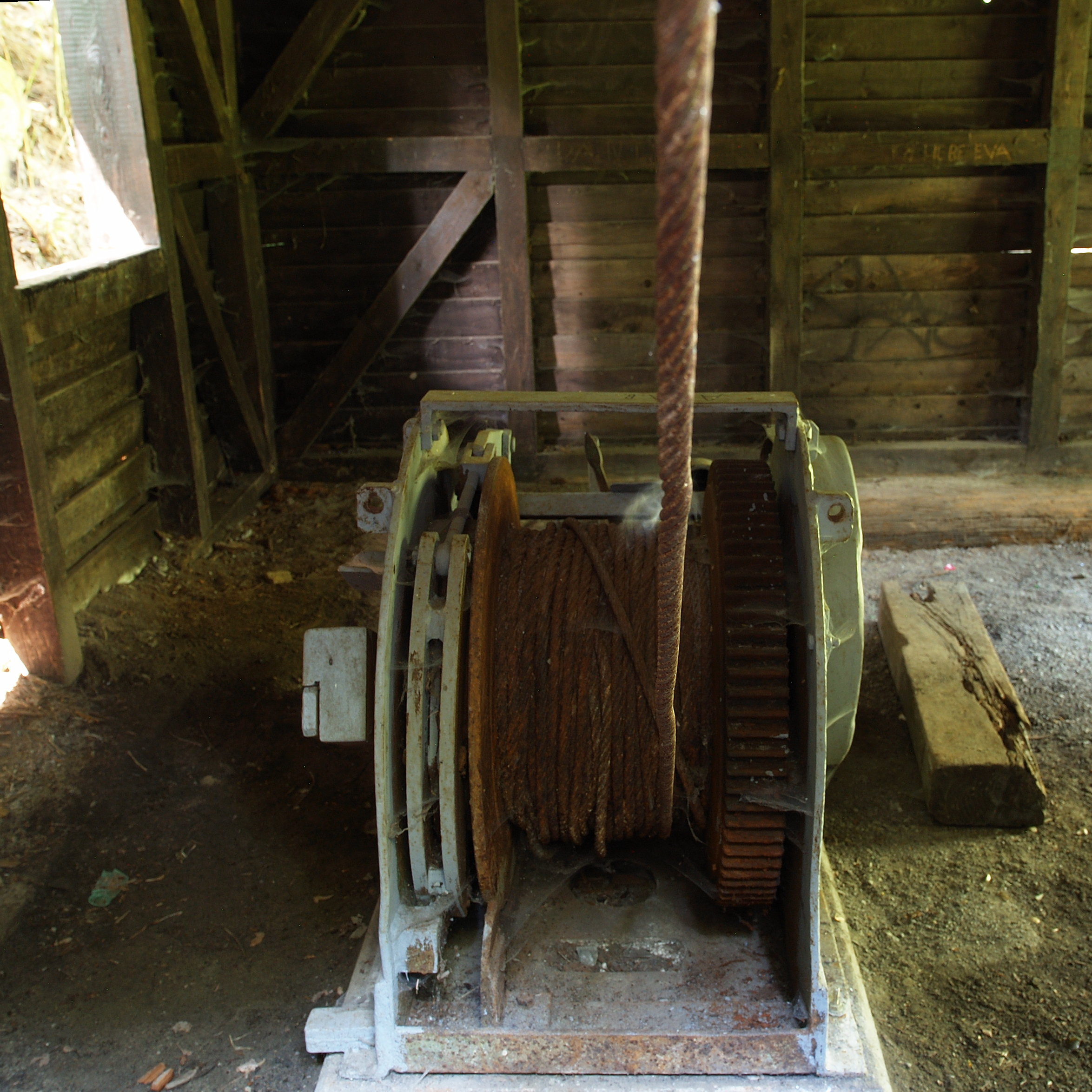 Förderhaspel der Zeche Renate im Muttental in Witten, Ansicht der Seiltrommel mit Bremse links und Antriebszahnrad rechts